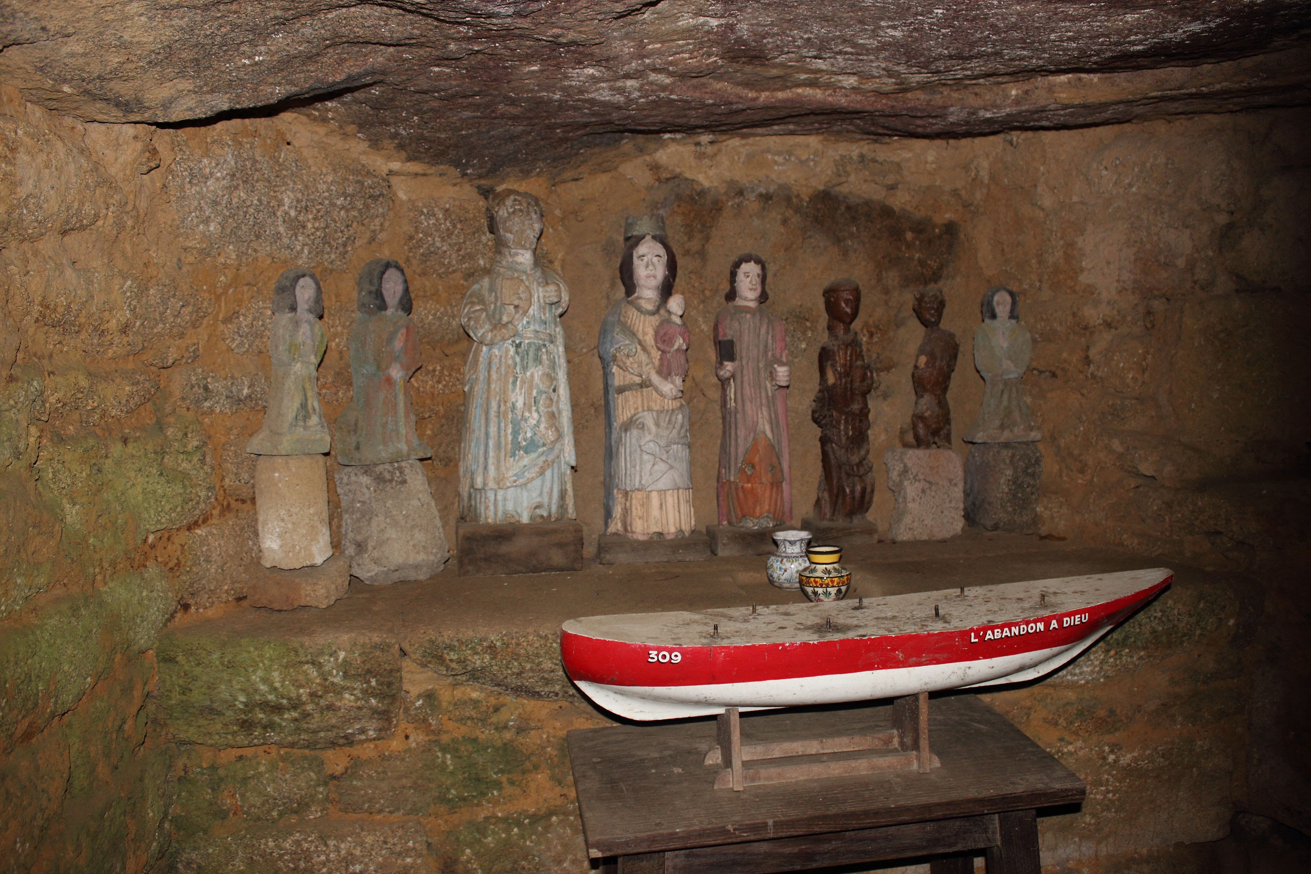 Vue de l'intérieur du dolmen de la chapelle des Sept-Saints sur la commune du Vieux-Marché en Côtes-d'Armor. .